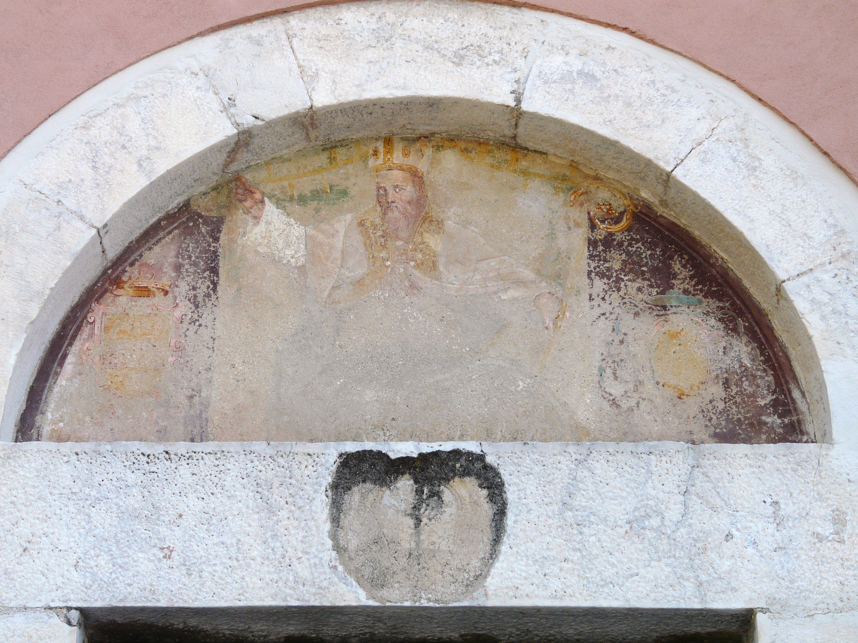 Particolare dell'affresco sulla facciata della chiesa di San Geminiano, Antona, Massa, Toscana, Italia